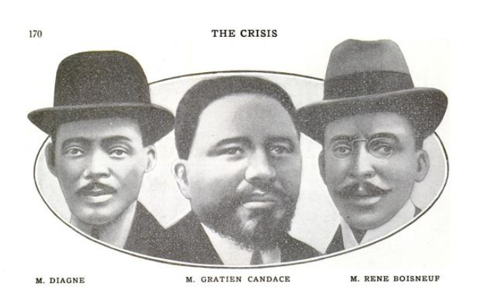 Illustration pour l'article Three members of Parliament, The Crisis, août 1914, Vol. 8,N° 4, ISSN 0011-1422, Publié par The Crisis Publishing Company, Inc., founded by W.E.B. Du Bois, p. 170